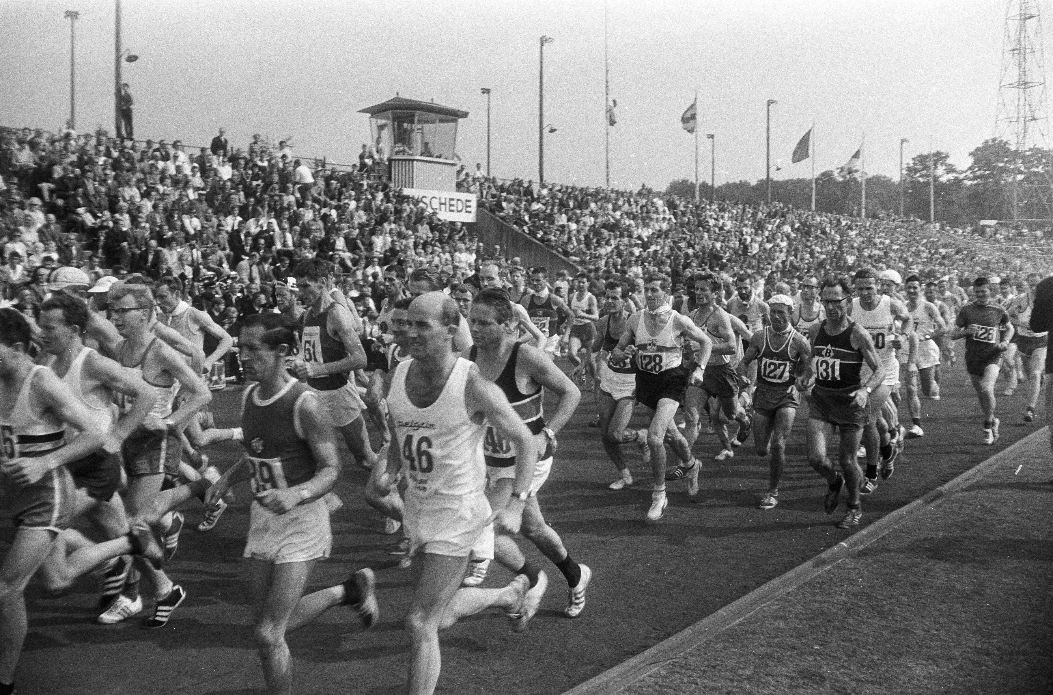 Collectie / Archief : Fotocollectie Anefo Reportage / Serie : [ onbekend ] Beschrijving : Elfde Internationale Marathon Enschede. Het rennersveld Datum : 26 augustus 1967 Locatie : Enschede Trefwoorden : MARATHONS Fotograaf : Merk, Ben / Anefo Auteursrechthebbende : Nationaal Archief Materiaalsoort : Negatief (zwart/wit) Nummer archiefinventaris : bekijk toegang 2.24.01.05 Bestanddeelnummer : 920-6393